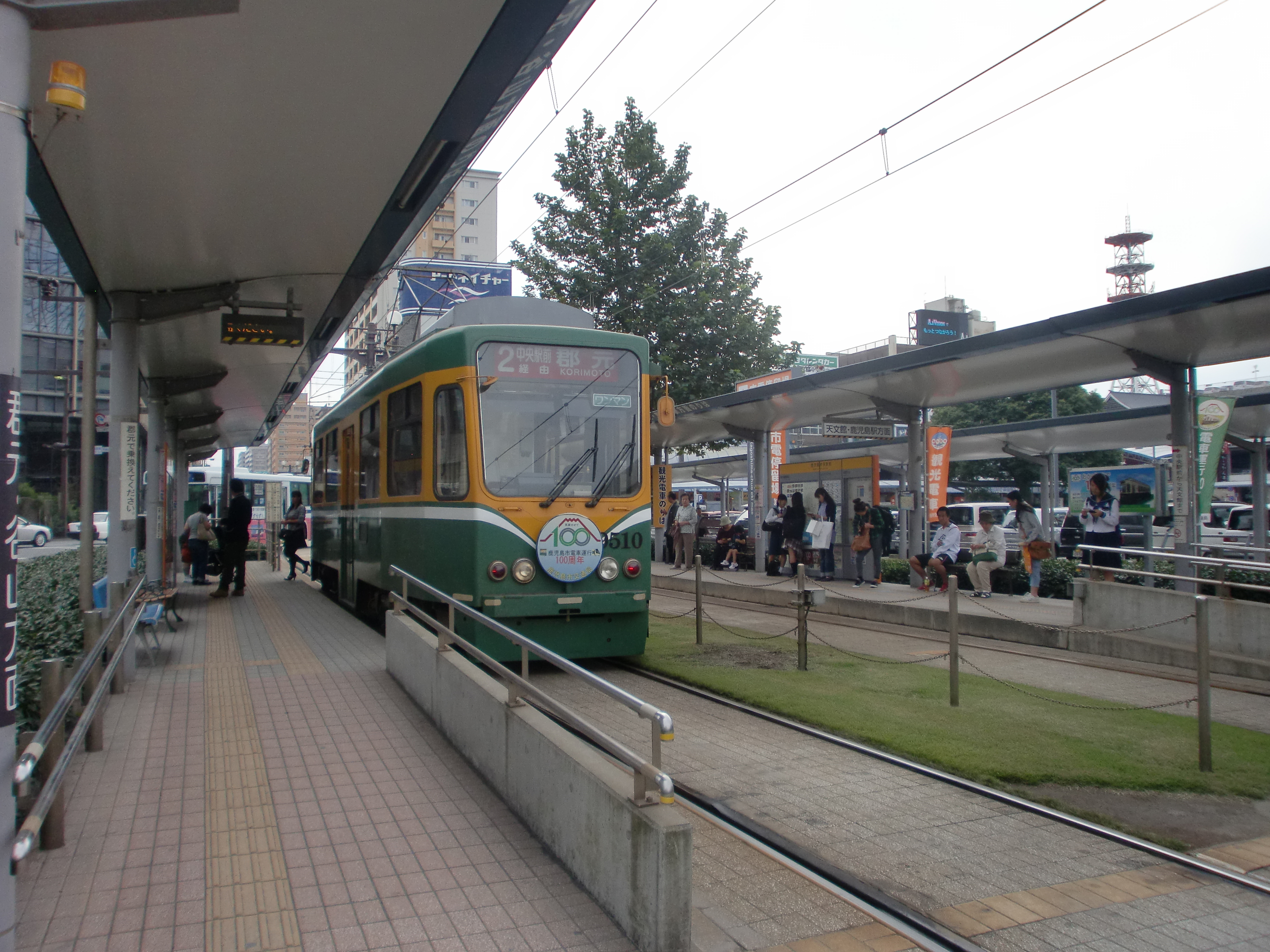 鹿児島市電鹿児島中央駅前駅のホーム（左側が谷山・郡元方面、右側が天文館方面）